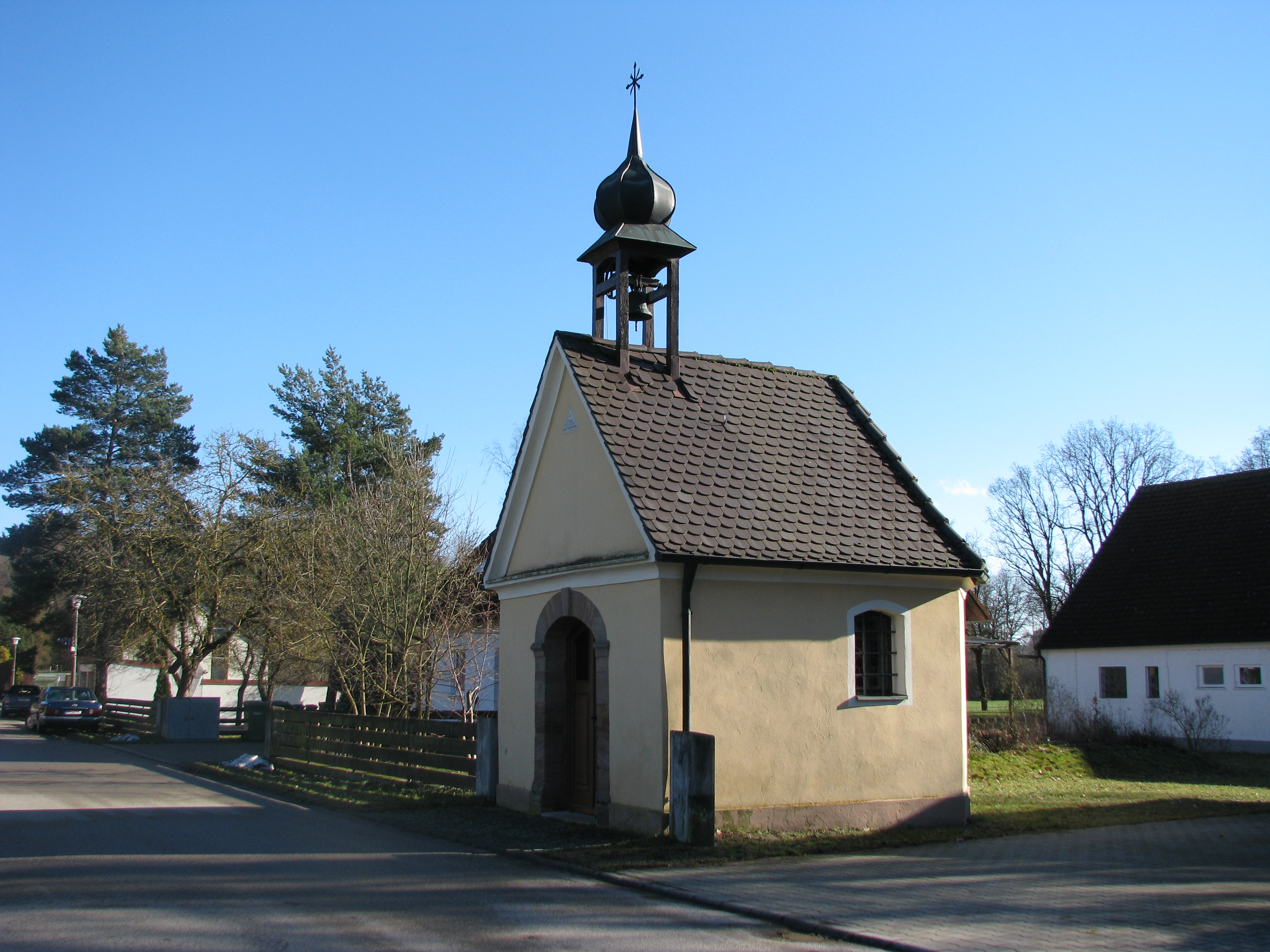 Altenhofen, Ortsteil von Hilpoltstein im mittelfränkischen Landkreis Roth, Katholische Ortskapelle